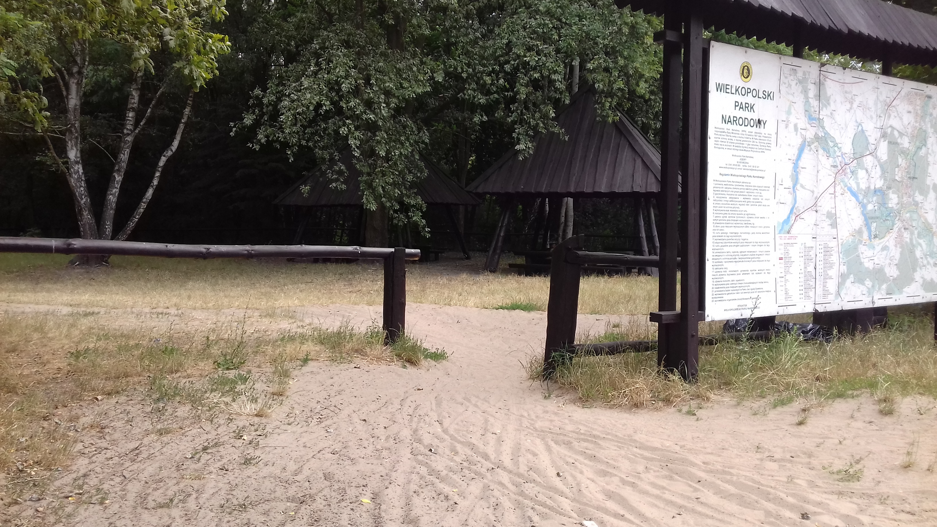 Wiata turystyczna przy szlaku pieszym im. Arkadego Fiedlera, Puszczykówko.